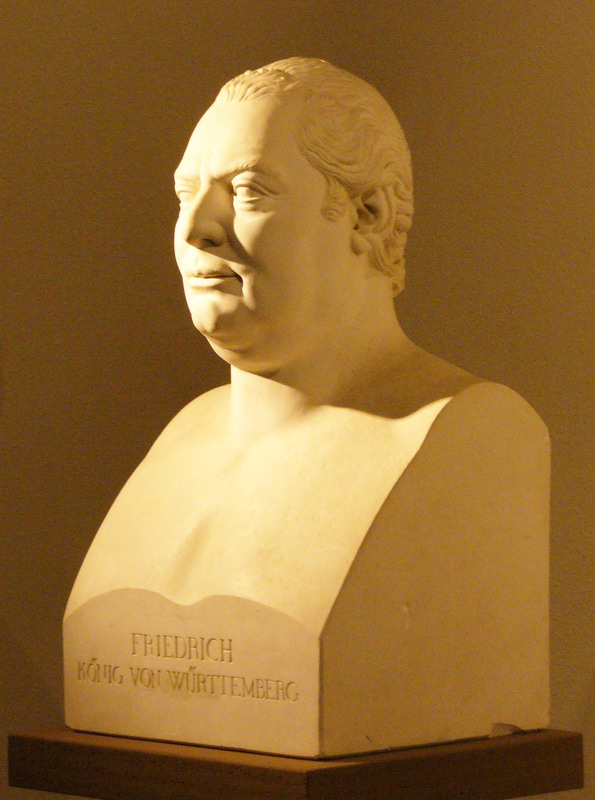 Bildbeschreibung: Büste des Königs Friedrich I von Württemberg von Johann Heinrich Dannecker Quelle: Grabkapelle Württemberg - Foto selbstgemacht Fotograf/Zeichner: Klaus Enslin Datum: 19-3-2006 Sonstiges